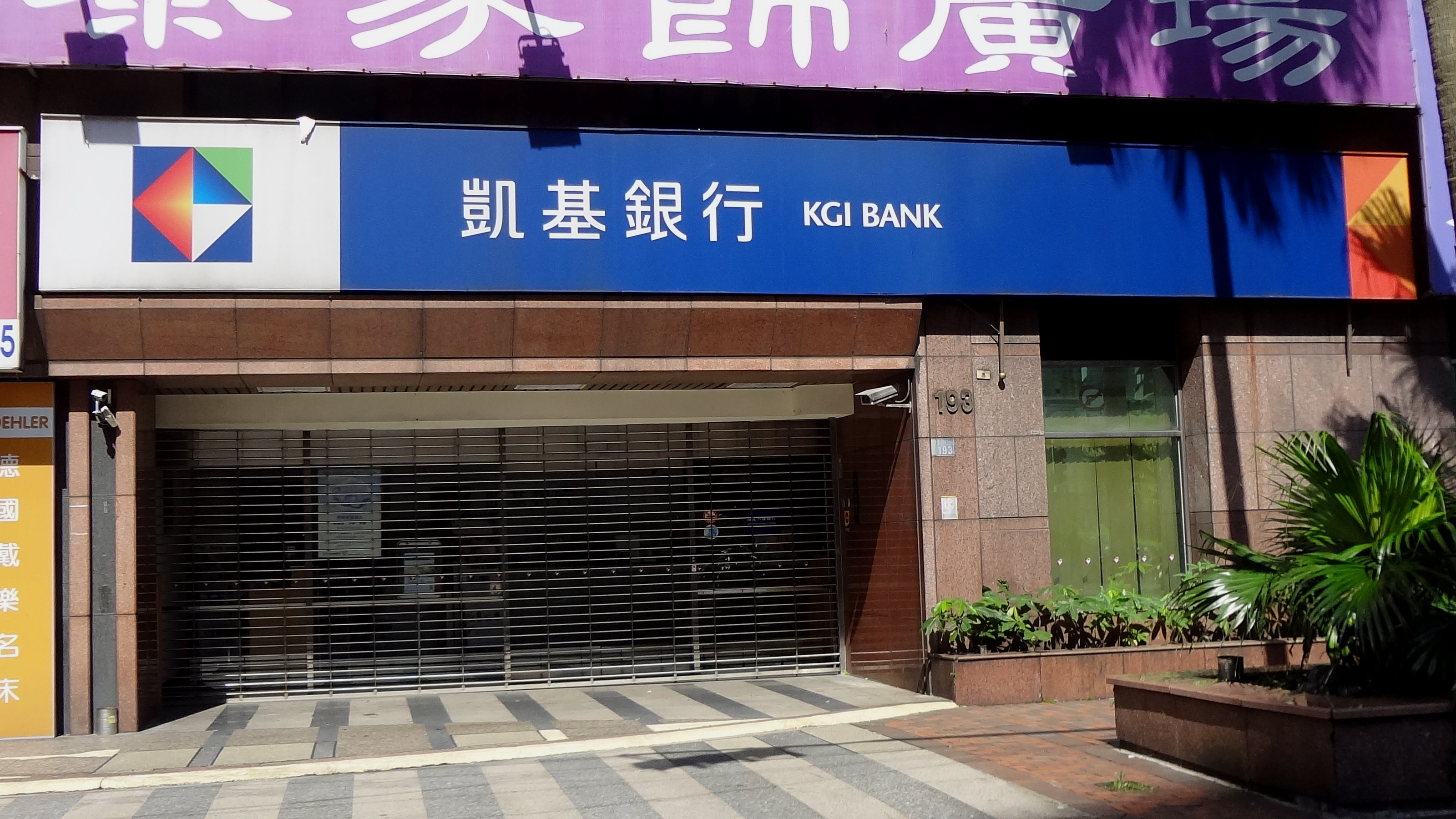 凱基商業銀行基隆分行，位於基隆市安樂區麥金路193號1樓。